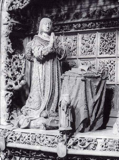 Alfonso di Castiglia, fratello di Isabella di Castiglia